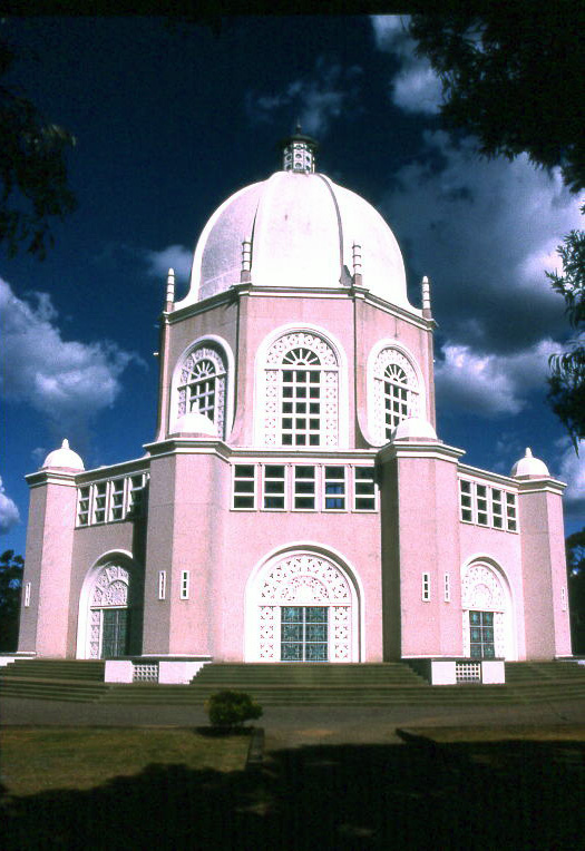 baha'i temple, sydney